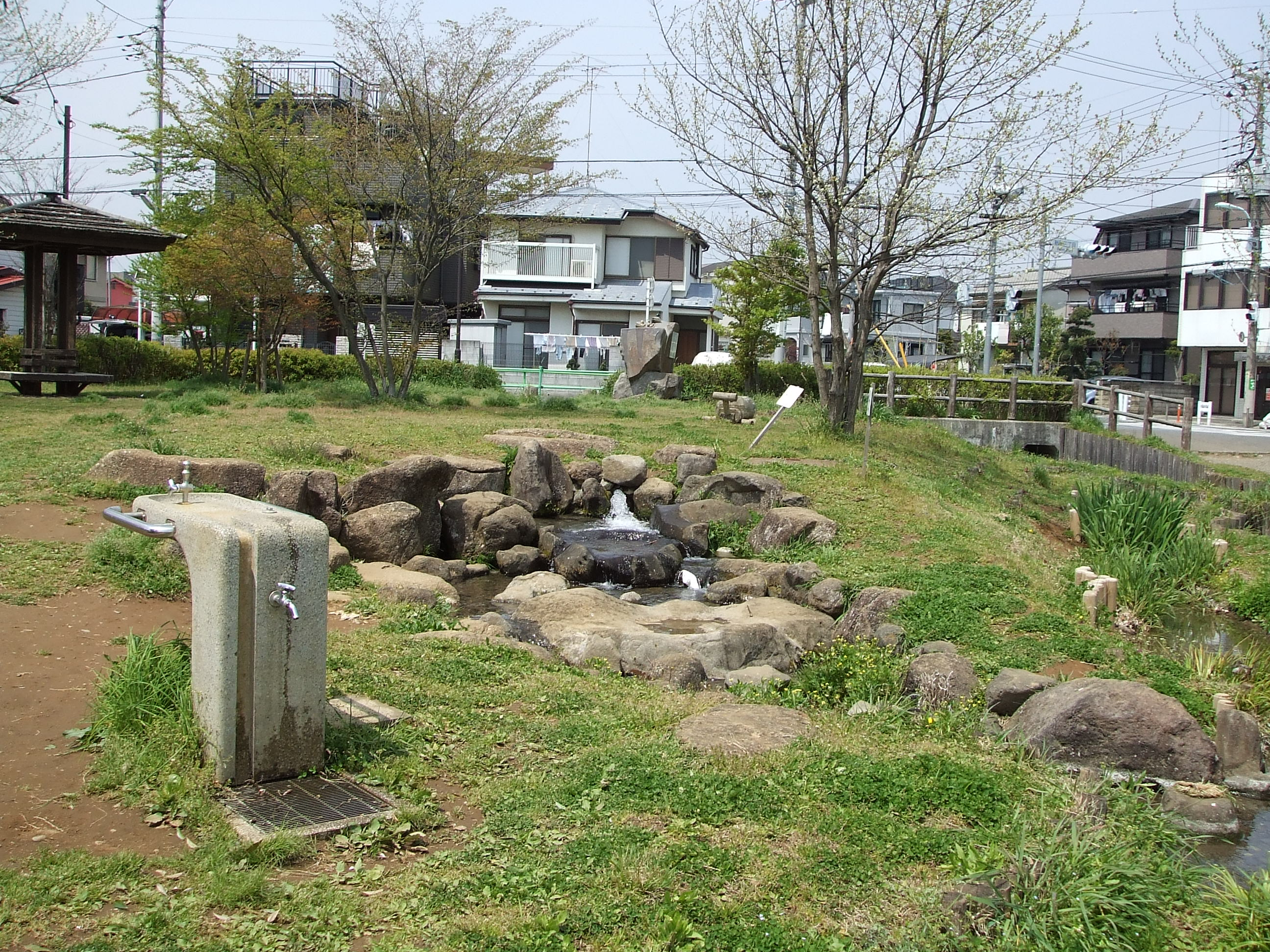 Hino-よそう森Park 01.JPGの派生